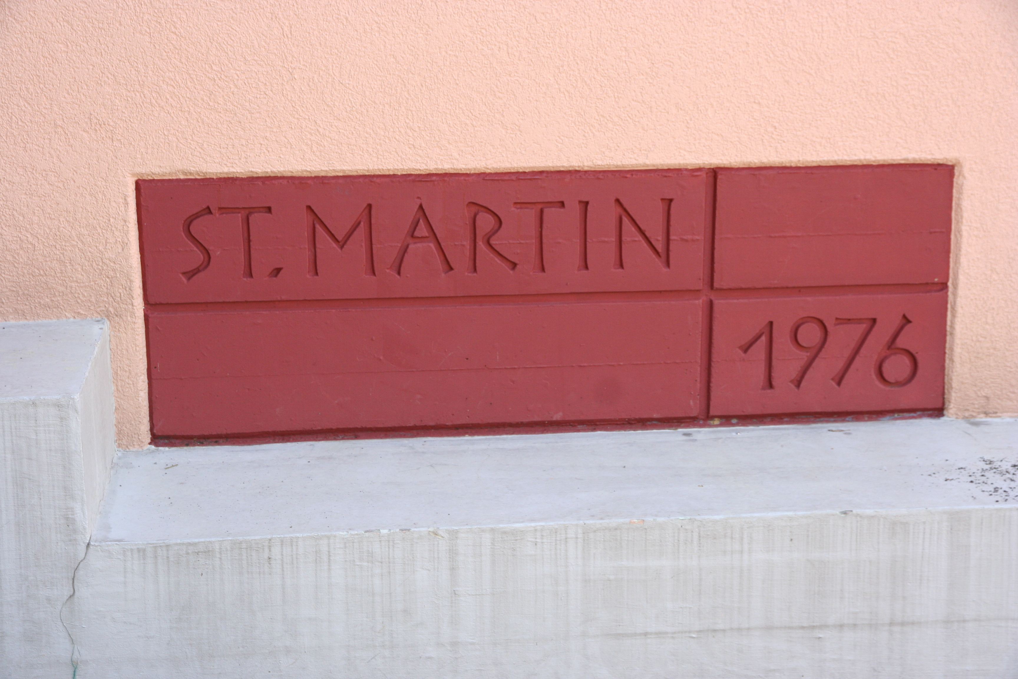 Römisch-katholische Pfarrkirche St. Martin Birmensdorf ZH